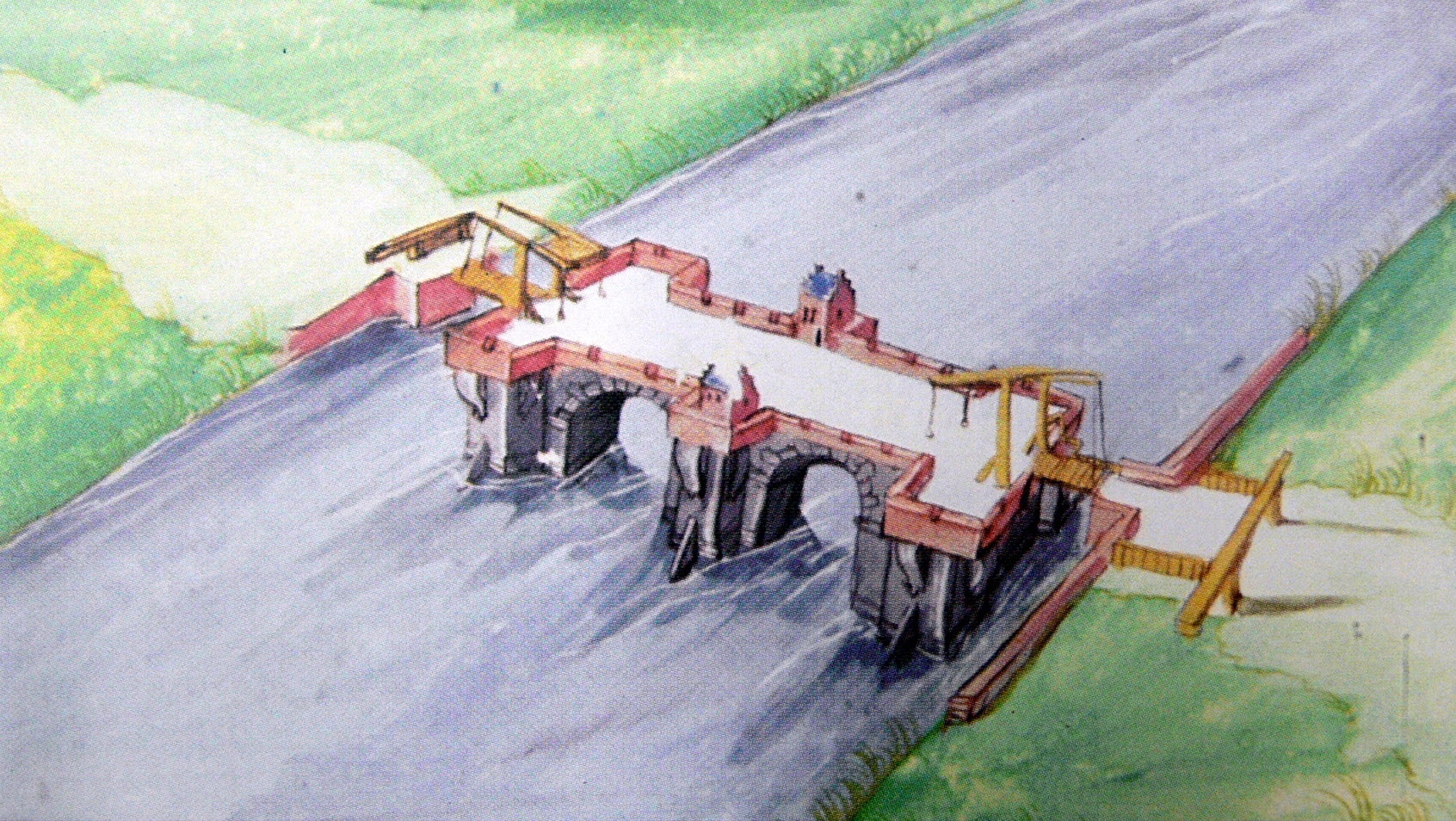 Dessin fait pour Charles de Croÿ (Albums de Croÿ): Plan et pourtraict du pont du Cabrughe à Heverle, sur la Dyle (non daté, mais proablement fait dans les années 1590). Cabrughe était un lieu dit se trouvant près du Chateau de Heverlee, près de l'église Saint Lambert (figuré sur une autre illustration du même ouvrage). Le mur crênelé qui ceinture en encorbellement la partie centrale du pont laisse penser qu'il est à la fois conçu (peut-être conçu par l'architecte Pierre Lepoivre pour le passage, péage et la défense de la route. Des barrières en bois interdisent aussi un accès direct et rapide aux ponts levis. Selon le plan original la rivière Dyle était à cet endroit large de 52 pieds environ, 14,8 m. Les maisons seraient donc très petites (poste de garde?), et les ponts levis étroits.